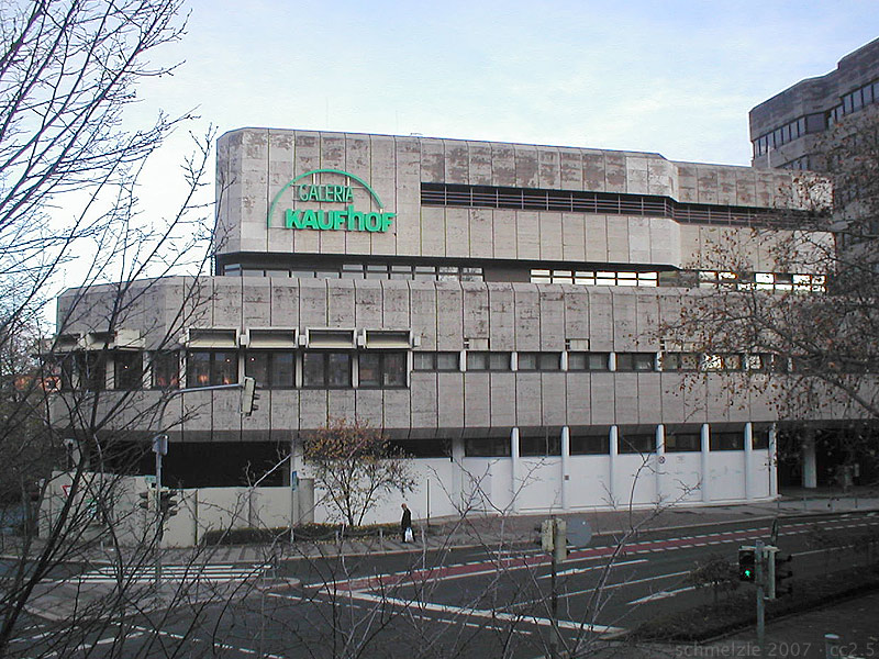 Seitentrakt des Wollhaus-Zentrums in Heilbronn